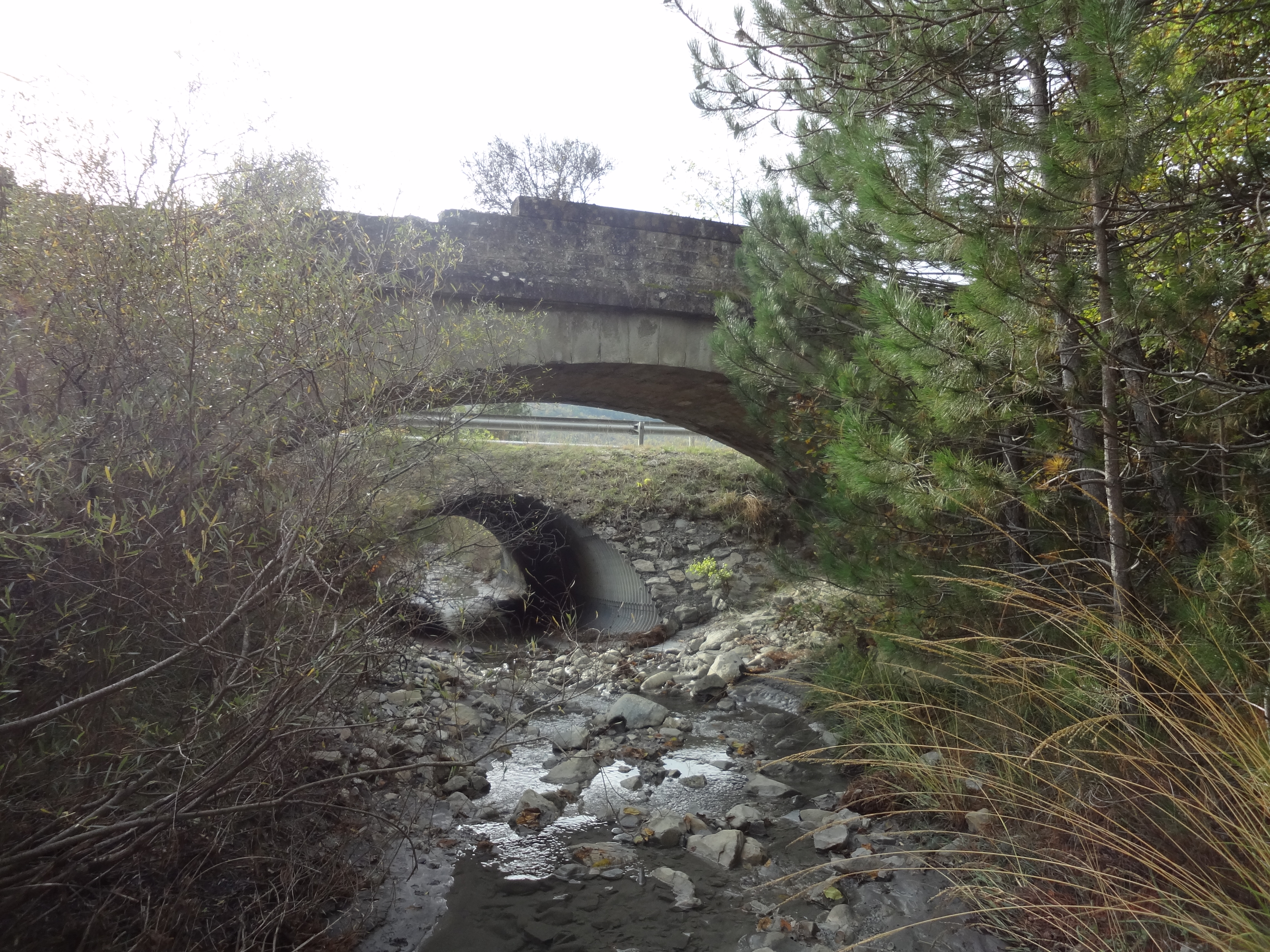 Pont sur l’ancienne route nationale 546 (actuelle RD 946) à Bevons, sur un Riou